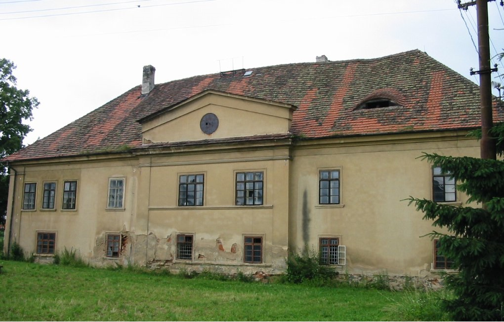 zámek v centru obce